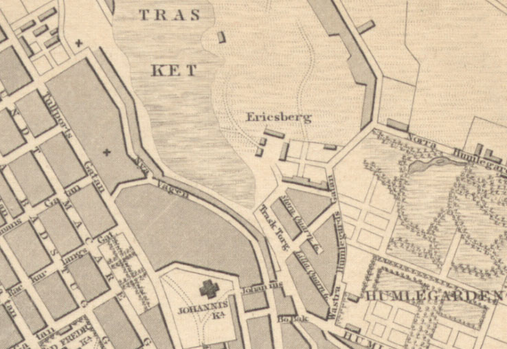 Detalj ur 1836 års stockholmskarta över Eriksberg och Träsket